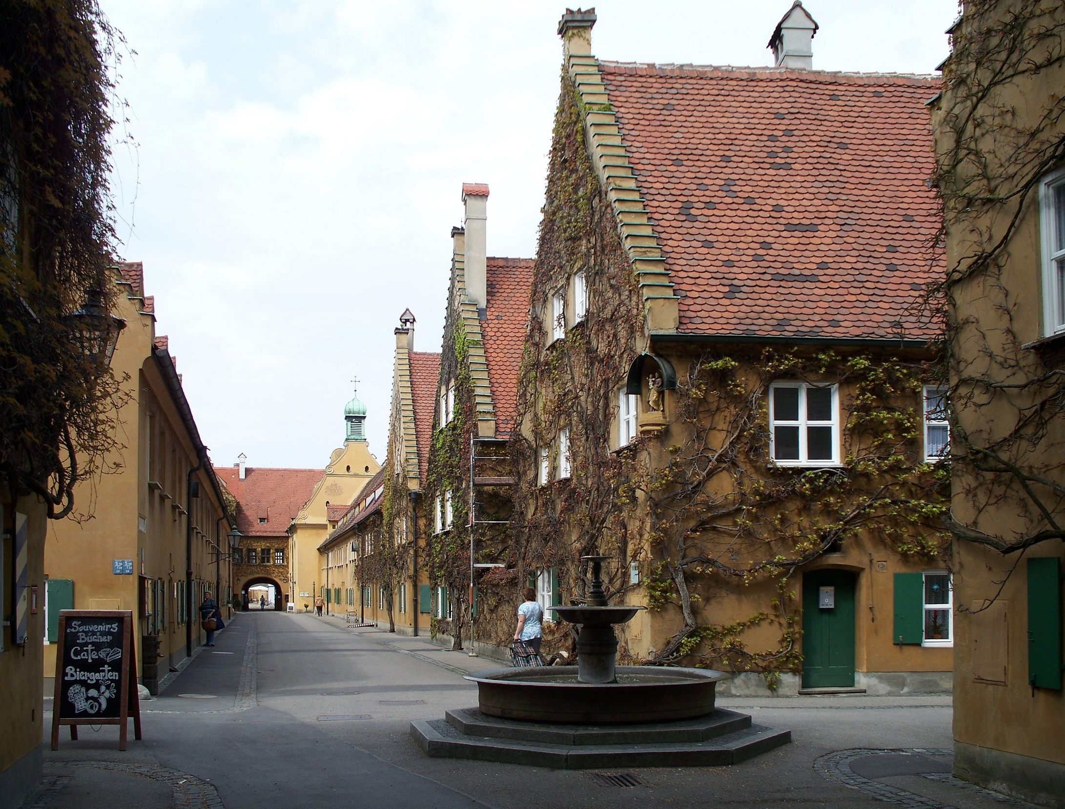 Die Herrengasse in der Fuggerei, Augsburg.